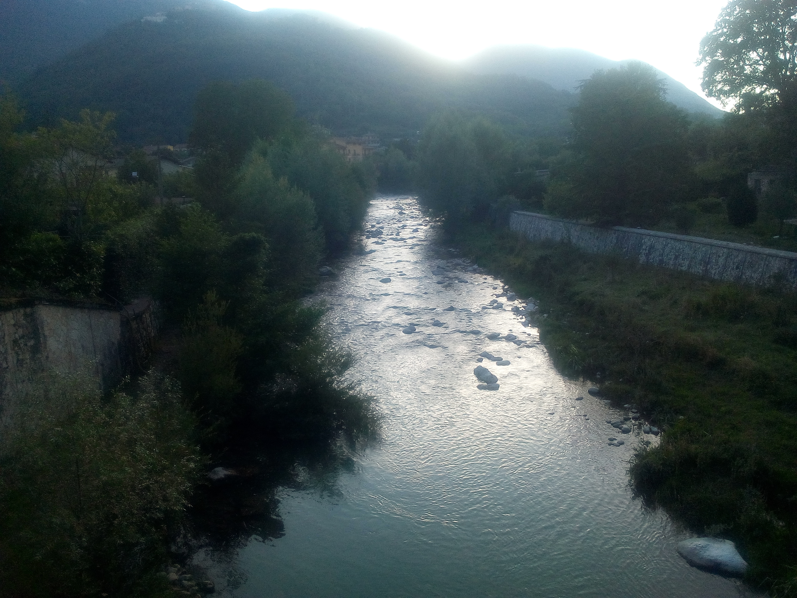 Fiume Liri (Canistro, Abruzzo)